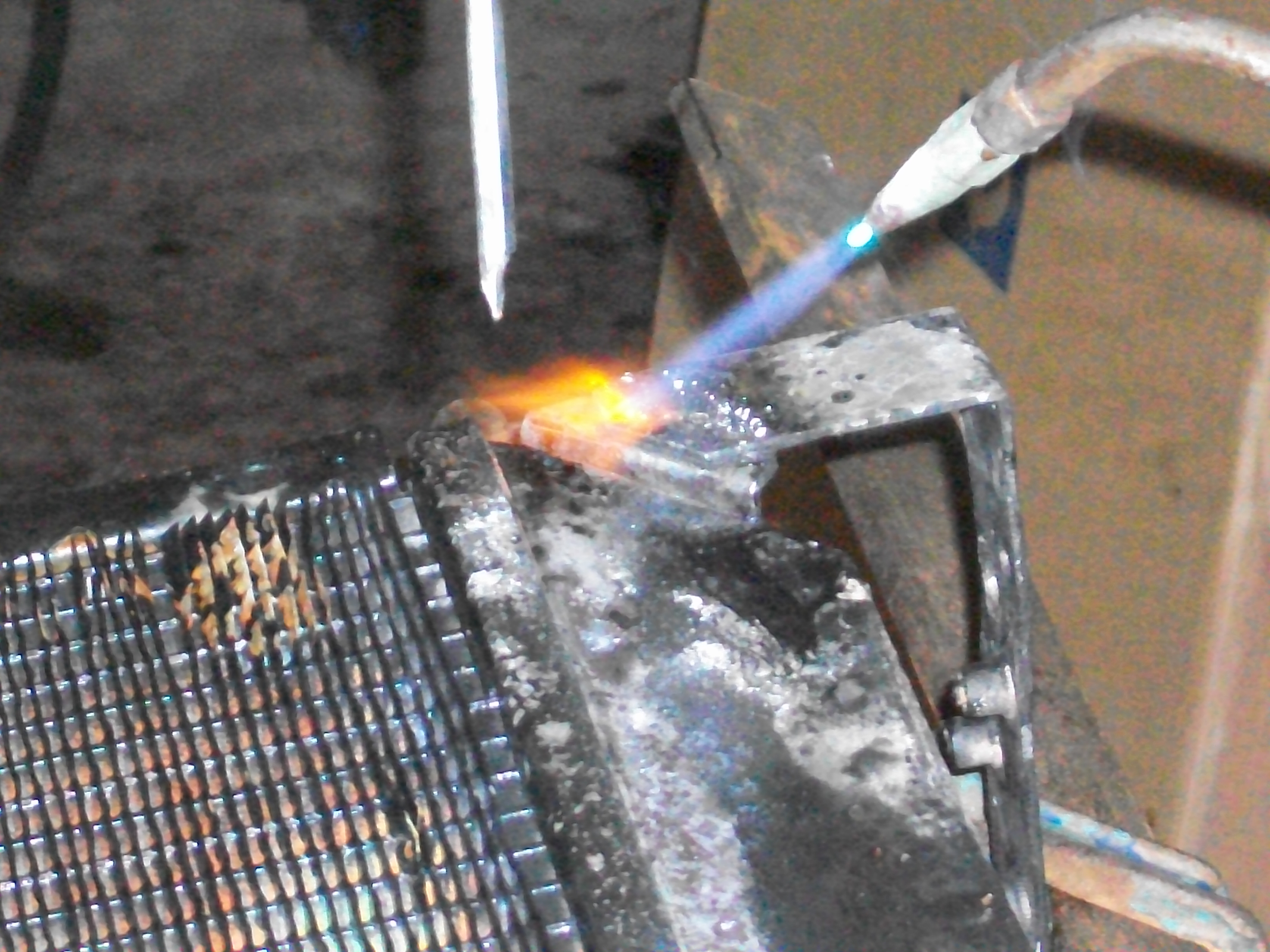 Forma de la llama en la salida del soplete.